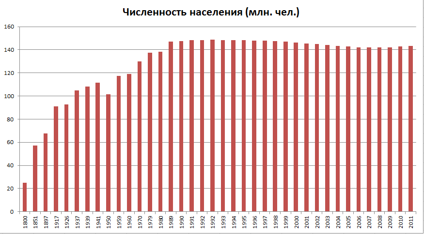 Гистограмма иллюстрирует динамику численности населения России с 1800 по 2012 гг.